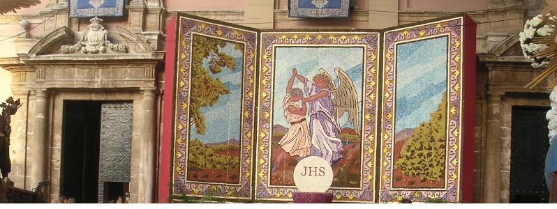 Decoració Frontera frontera Basilica de la Mare de Deu dels Desamparats pera la festa del Corpus de Valencia.